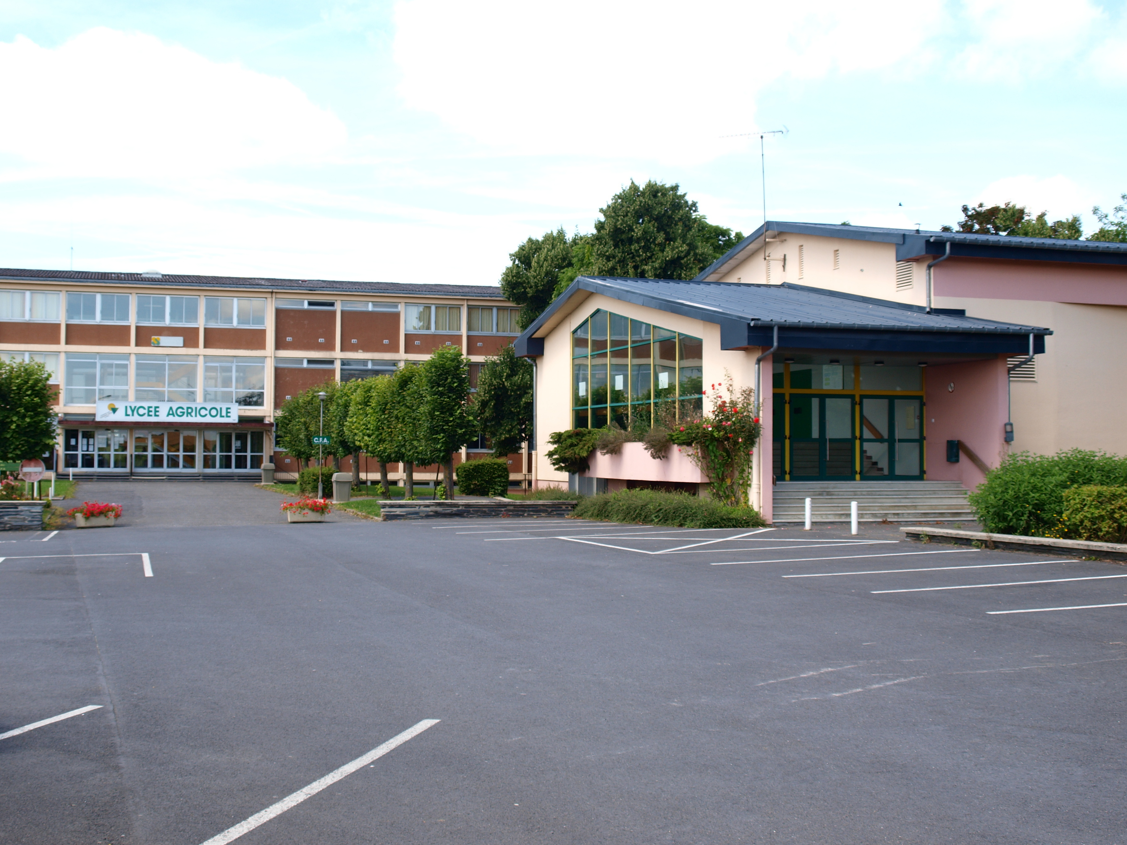 Lycée agricole de Rethel (Ardennes, France)